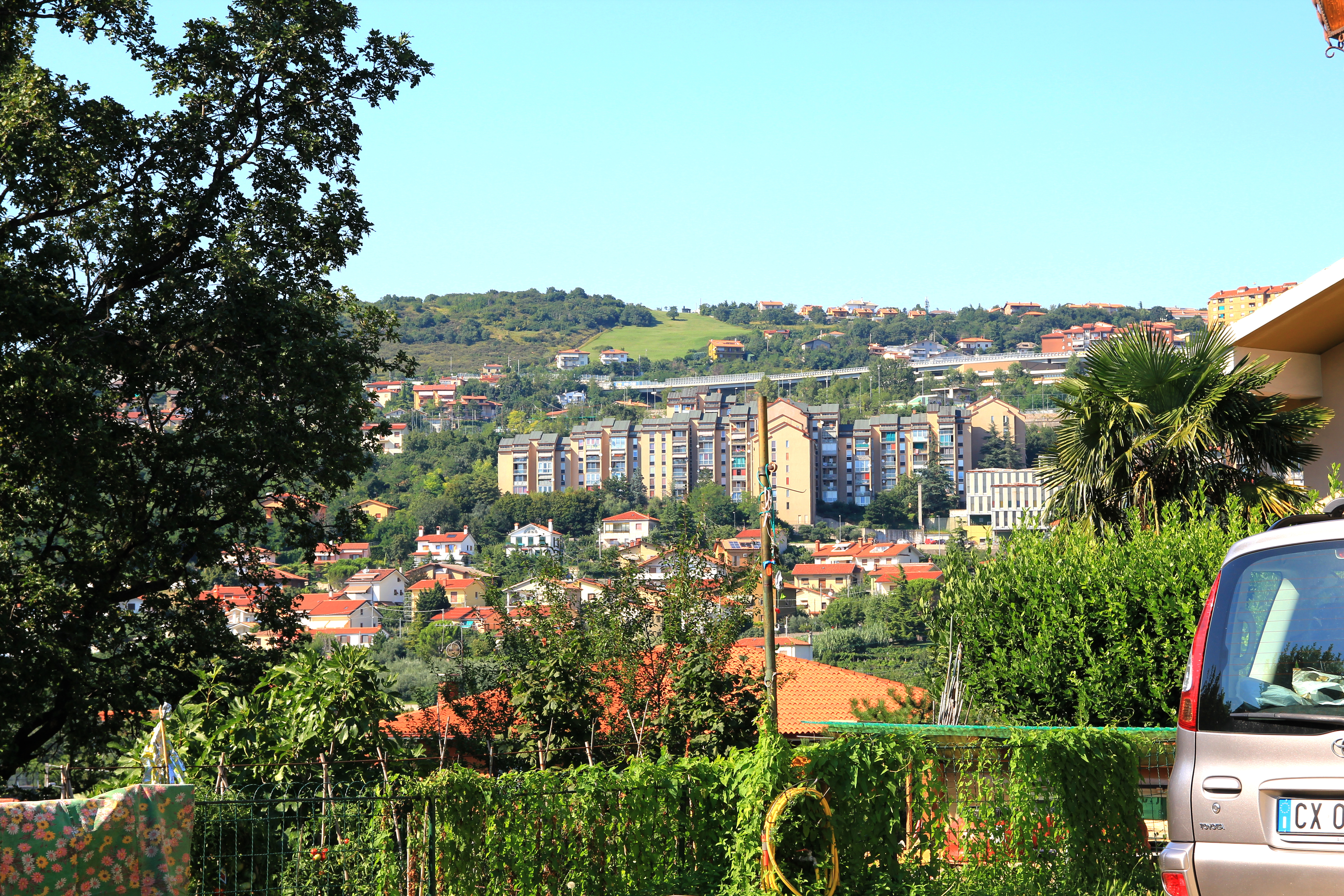 Altura vista da via Sillani